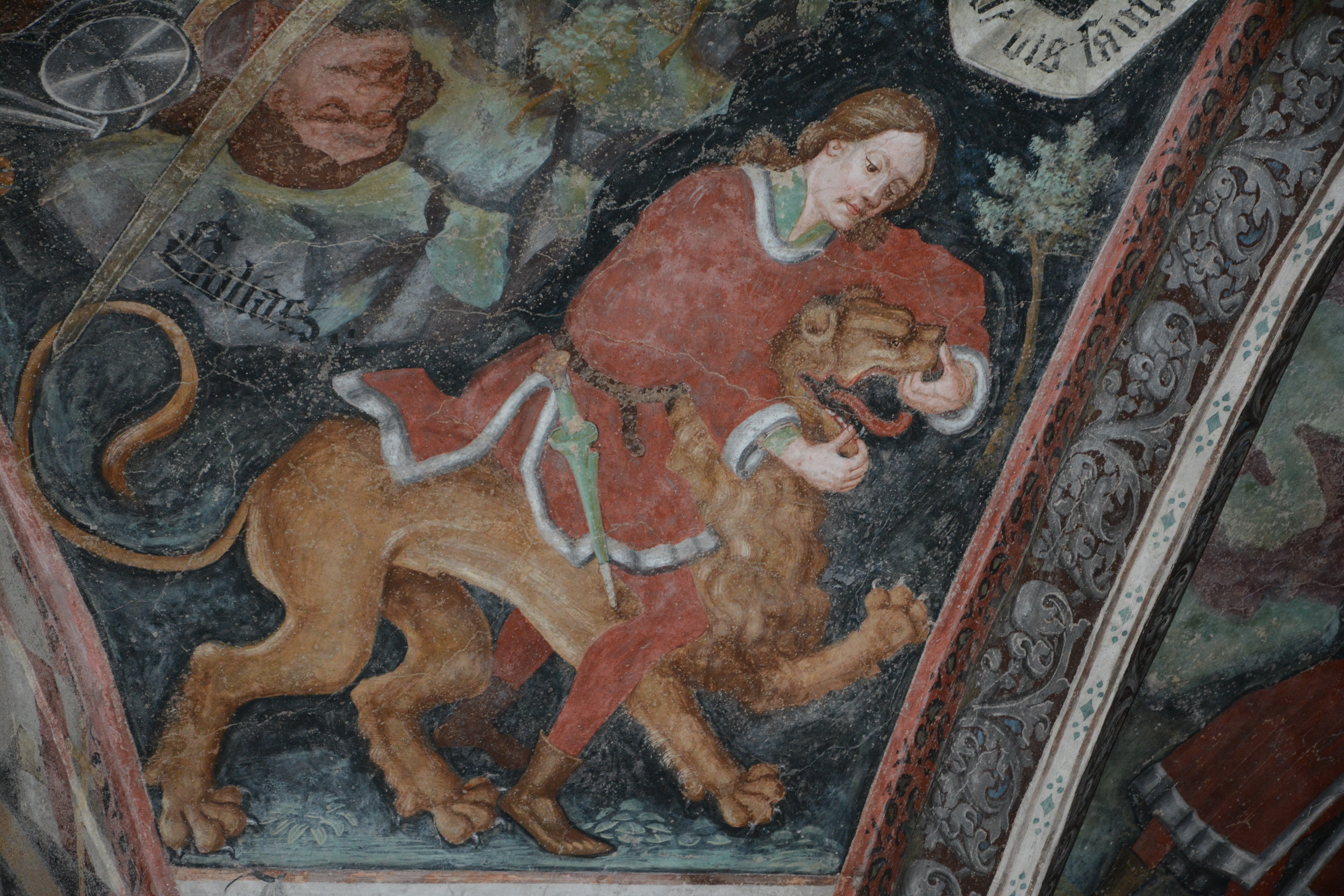 Fresko im Kreuzgang des Brixner Domes, Gewölbe der 5. Arkade: Samsons Kampf mit dem Löwen. Meister Leonhard von Brixen, um 1472.